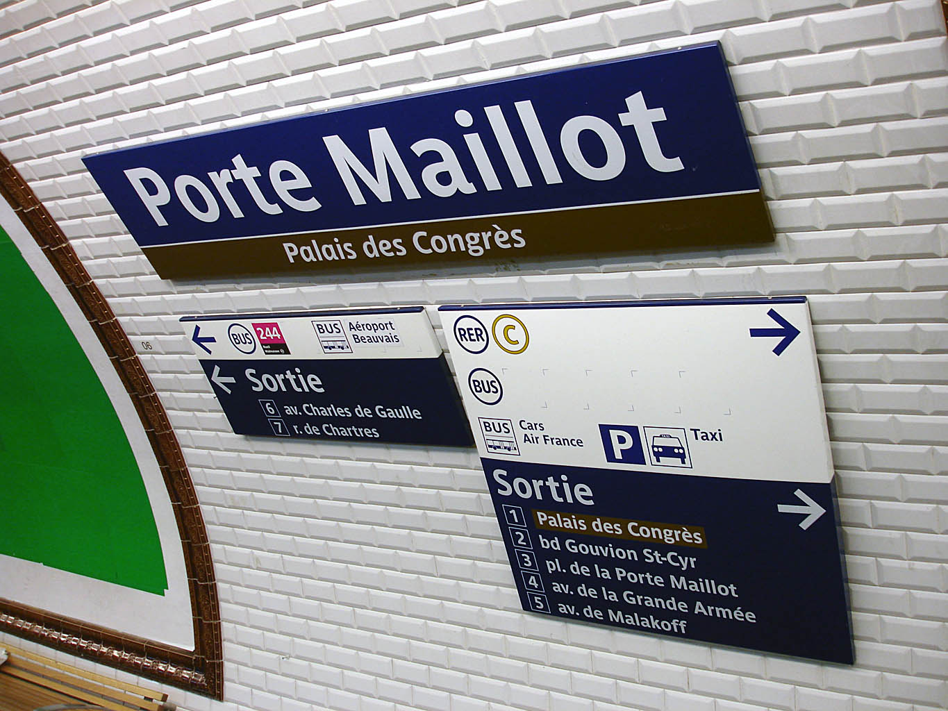 Station Porte Maillot de la ligne 1 du métro de Paris, France.